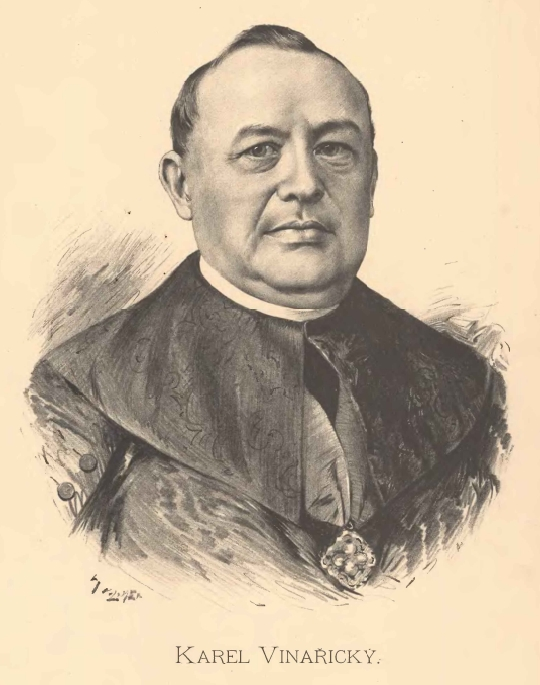 Portréty předních osobností od Jana Vilímka